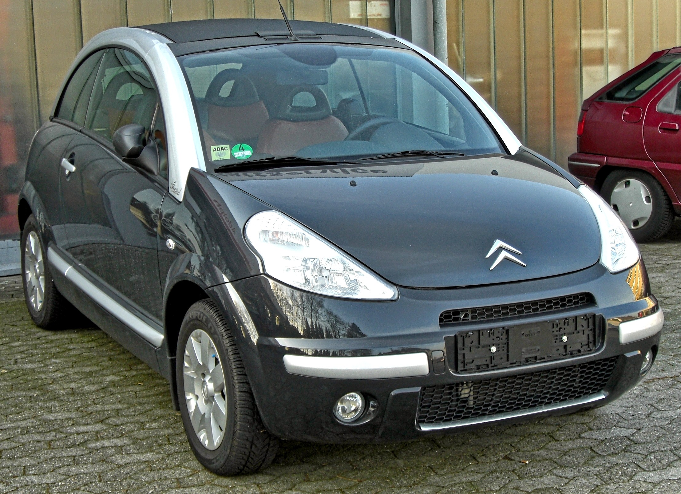 Citroën C3 Pluriel